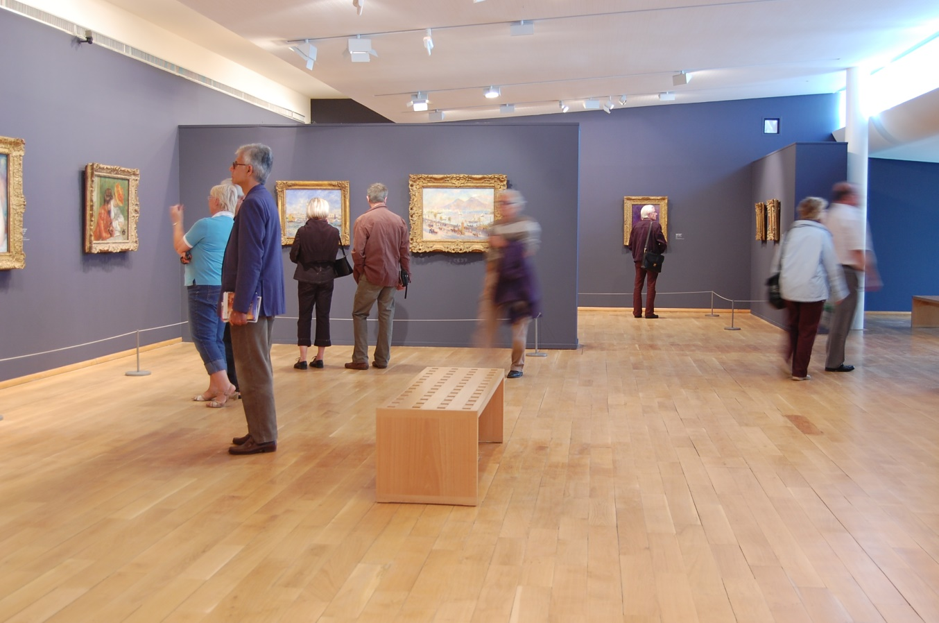 Galeries du musée des impressionnismes Giverny